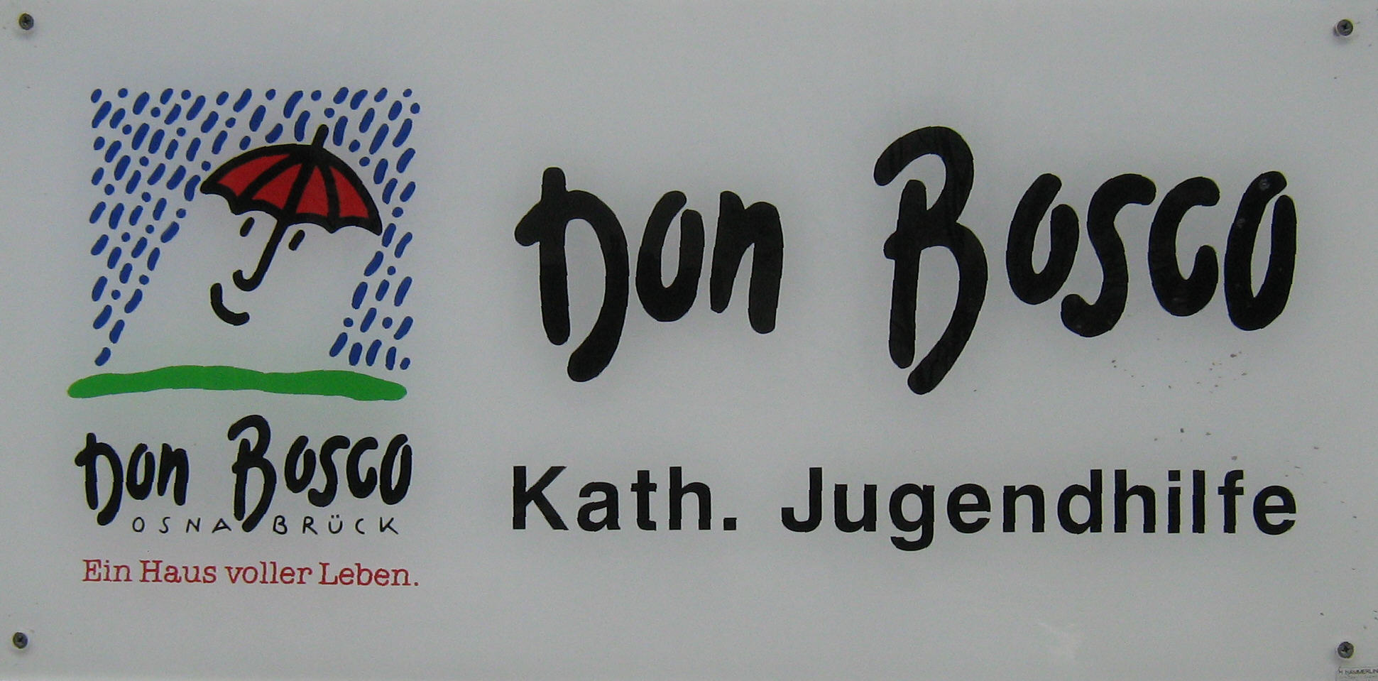 Don Bosco Kath. Jugendhilfe Schild